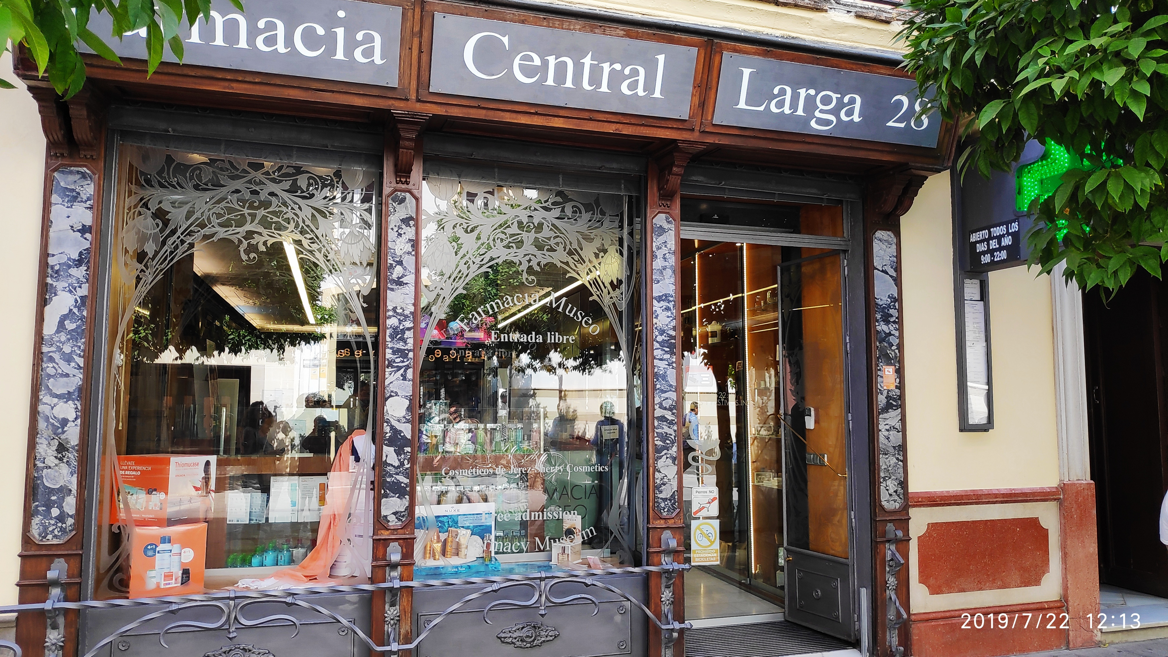 Farmacia Central, Calle Larga, 28 de Jerez de la Frontera (provincia de Cádiz). Antigua Botica del Doctor Cafranga en el siglo XIX.